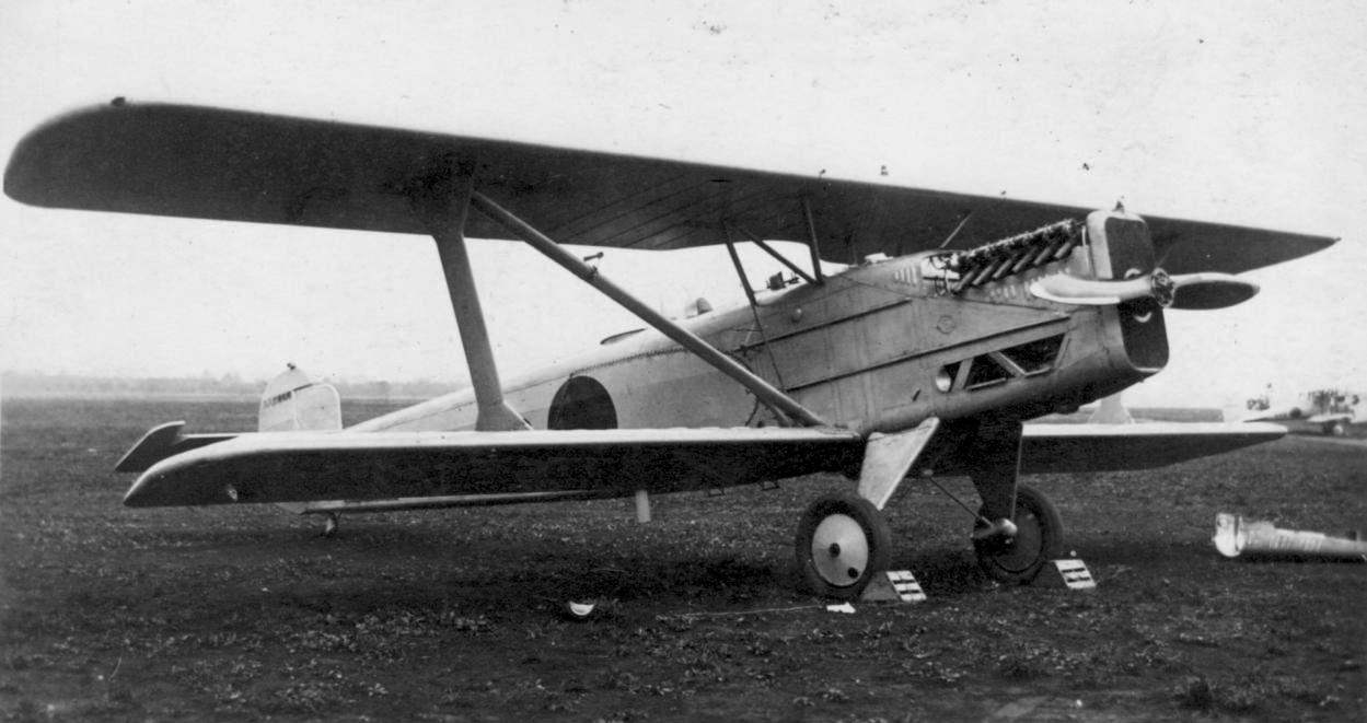 88式偵察機